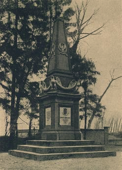 Pomnik poległym szwoleżerom w bitwie pod Somosierrą